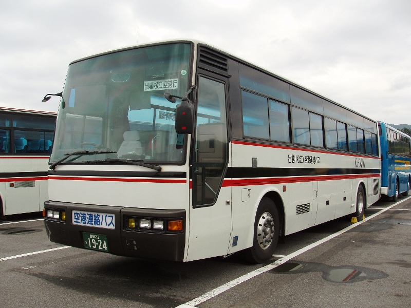 事業者: 松江一畑交通 陸運登録: 島根22き19-24 シャーシ: いすゞ自動車 P-LV719R 車体: IKコーチ 年式: 1988年 撮影場所: 松江一畑交通本社（許可を得て撮影）